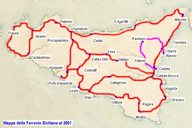 Mappa della rete ferroviaria della Sicilia nel 2007.